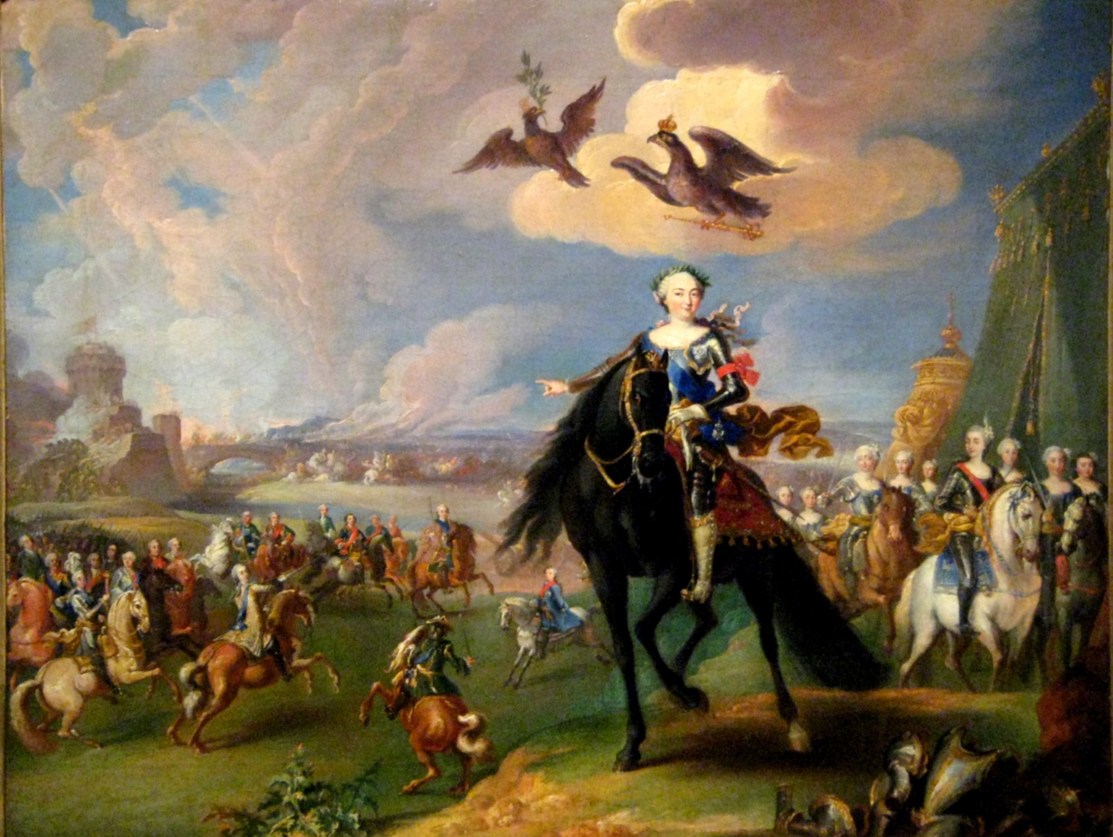 Елизавета Петровна изображена в латах, с орденами Св. Андрея Первозванного (лента и звезда) и Св. Екатерины (бант из орденской ленты на левой руке). Слева - конная группа вельмож во главе с великим князем Петром Федоровичем, изображенным с лентой и звездой ордена Св. Андрея Первозванного. Справа - конная группа статс-дам, среди которых великая княгиня Екатерина Алексеевна. На заднем плане - сцена осады русскими войсками турецкой крепости. Над головой императрицы парят два орла: один - в короне и со скипетром, у другого на голове золотой вензель императрицы, в клюве - оливковая ветвь. В Каталоге 1980 не датирован. Нижняя временная граница определяется наличием у великой княгини Екатерины Алексеевны ленты и звезды ордена Св. Екатерины, который она получила в феврале 1744. Верхняя граница - отъездом Преннера из России летом 1755.